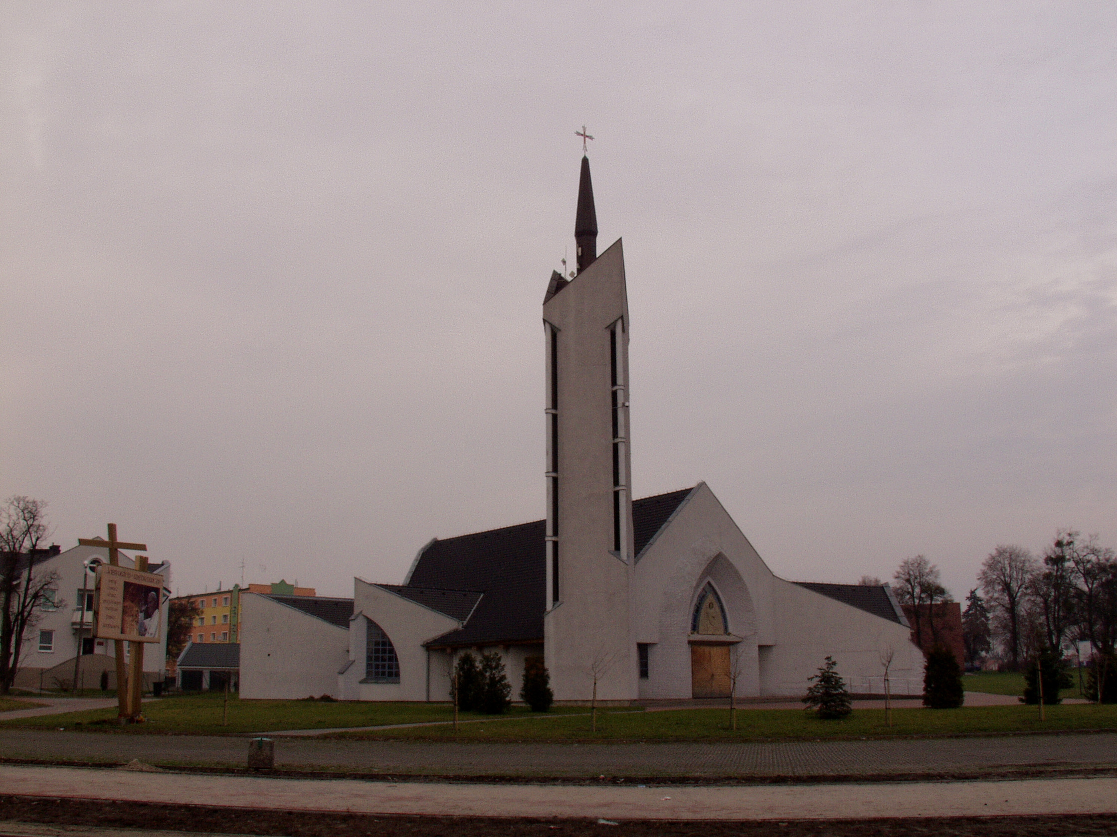 Kwidzyn, ul. Sportowa 3a - rzymskokatolicki kościół parafialny pw. św. Wojciecha Biskupa i Męczennika.